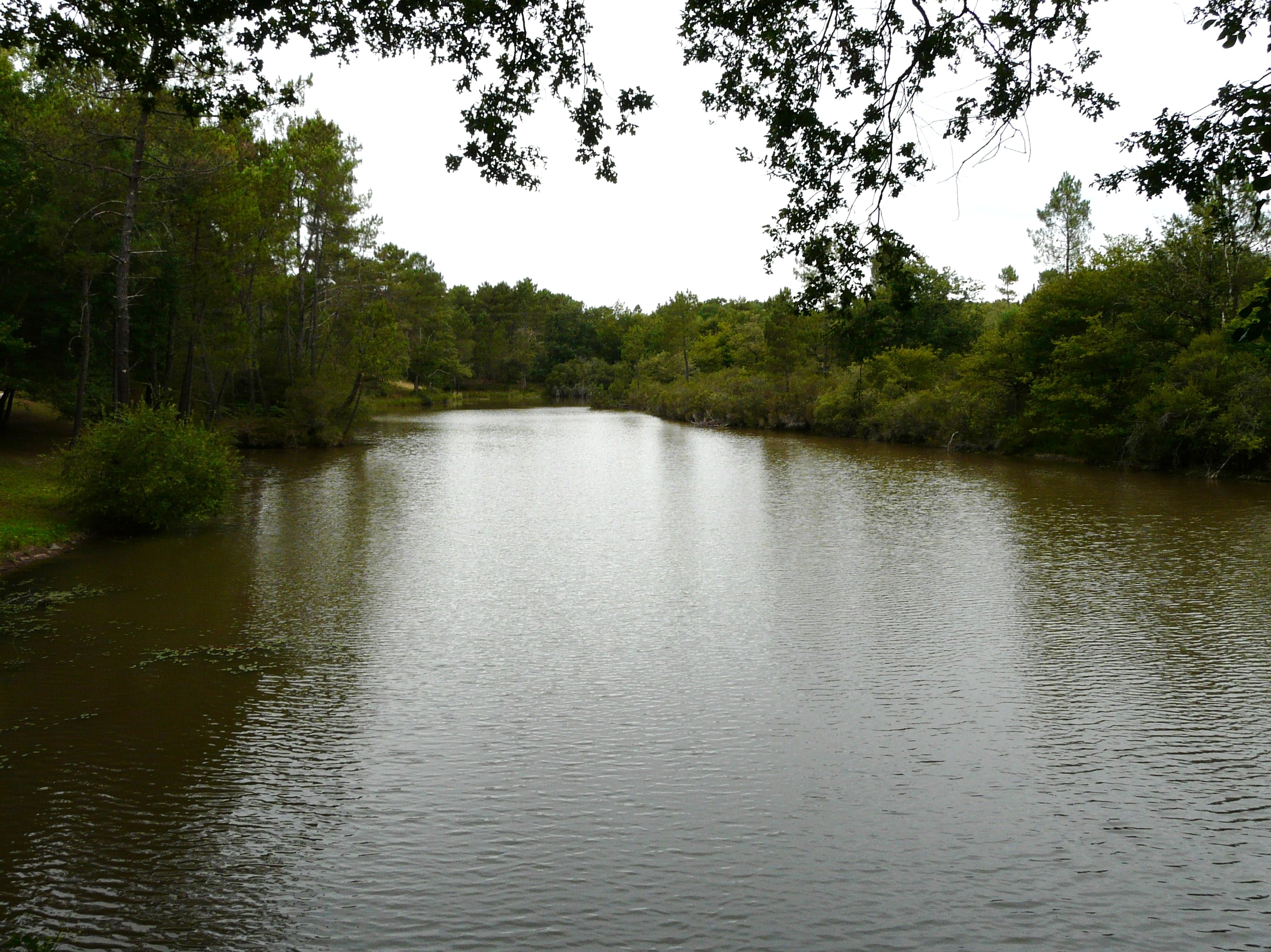 En forêt de la Double, l'étang de la Maîtresse à Eygurande-et-Gardedeuil, Dordogne, France.